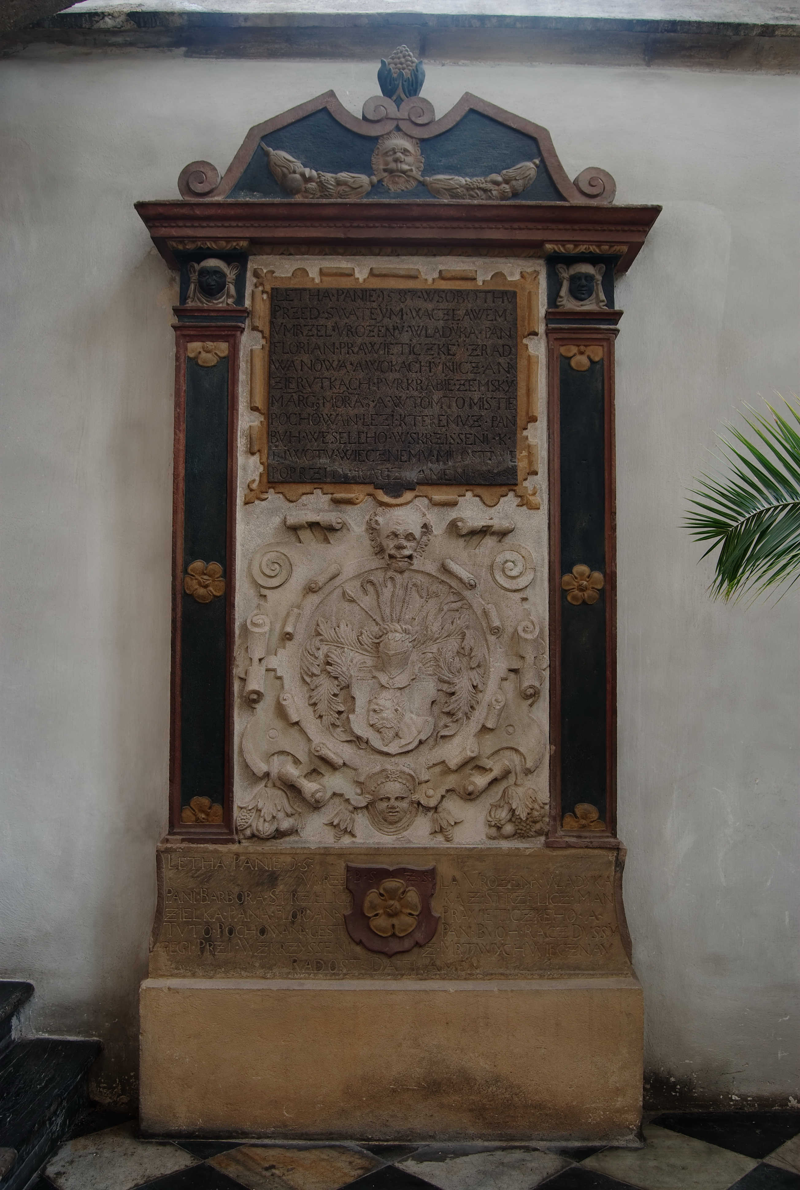 Město Brno - náhrobek Floriána Pravětického z Radvanova a jeho manželky Boženy Střelické ze Střelic v kostele Sv. Jakuba